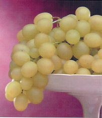 Uva